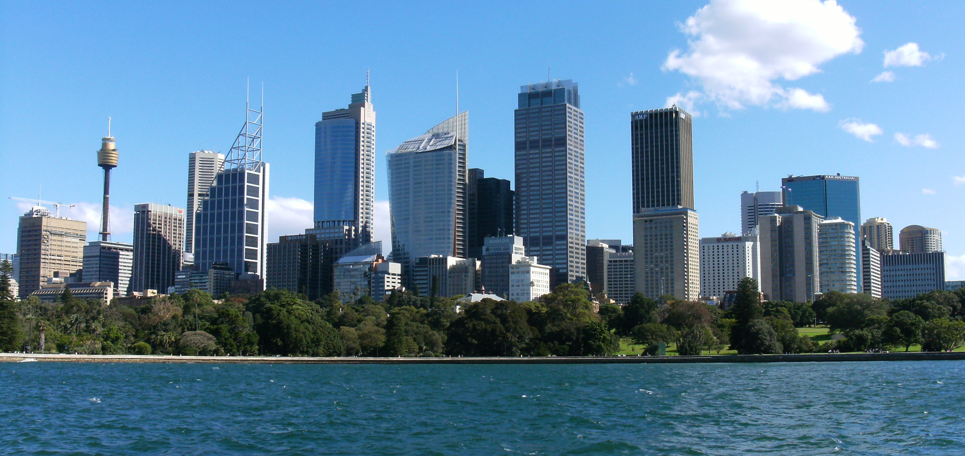 Sydney skyline